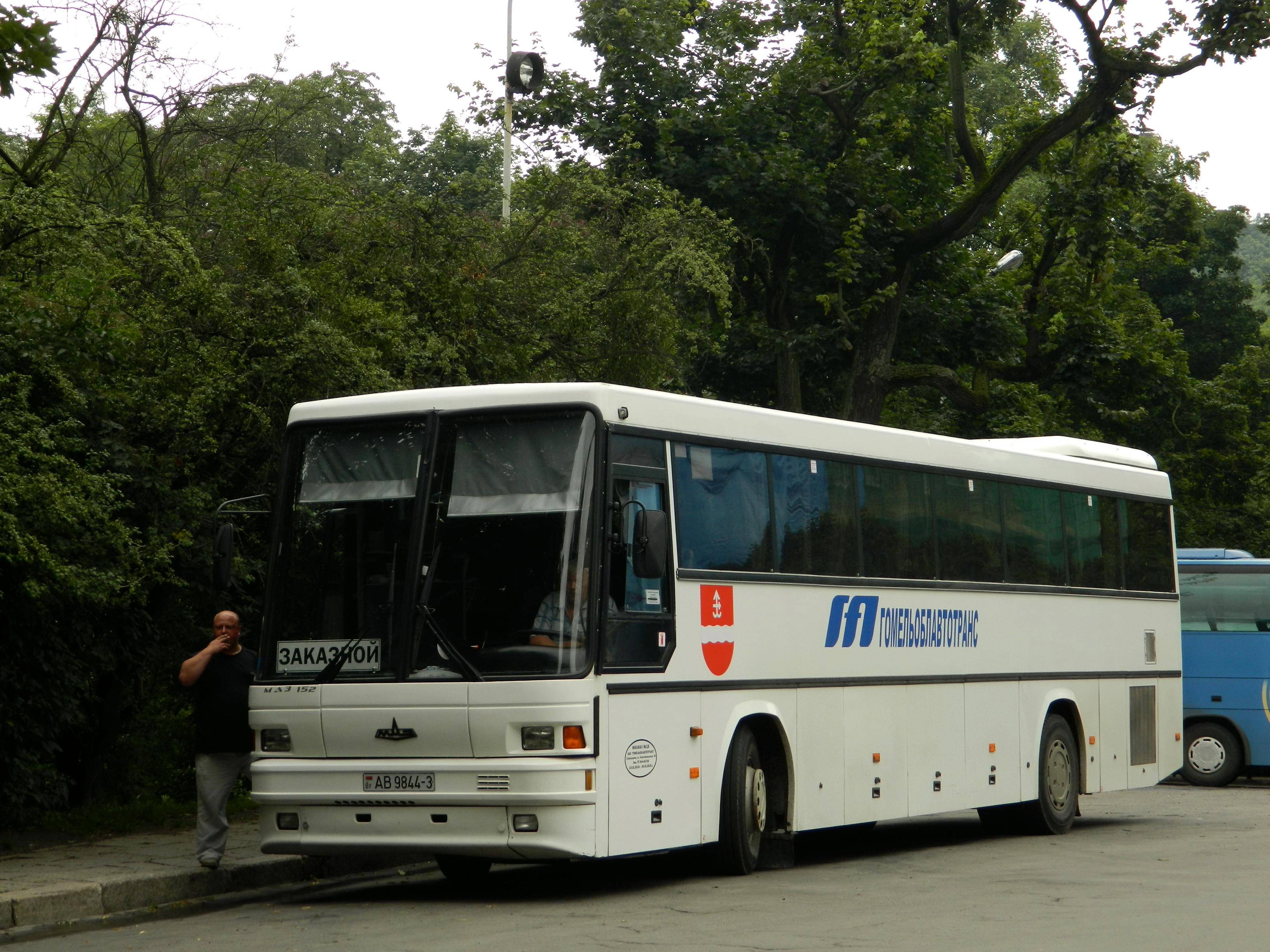 MAZ-152 bus, built 2006-2007, Gomeloblautotrans operator